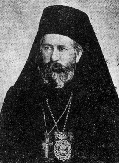 Священномученик Иоанникий, митрополит Черногорско-Приморский